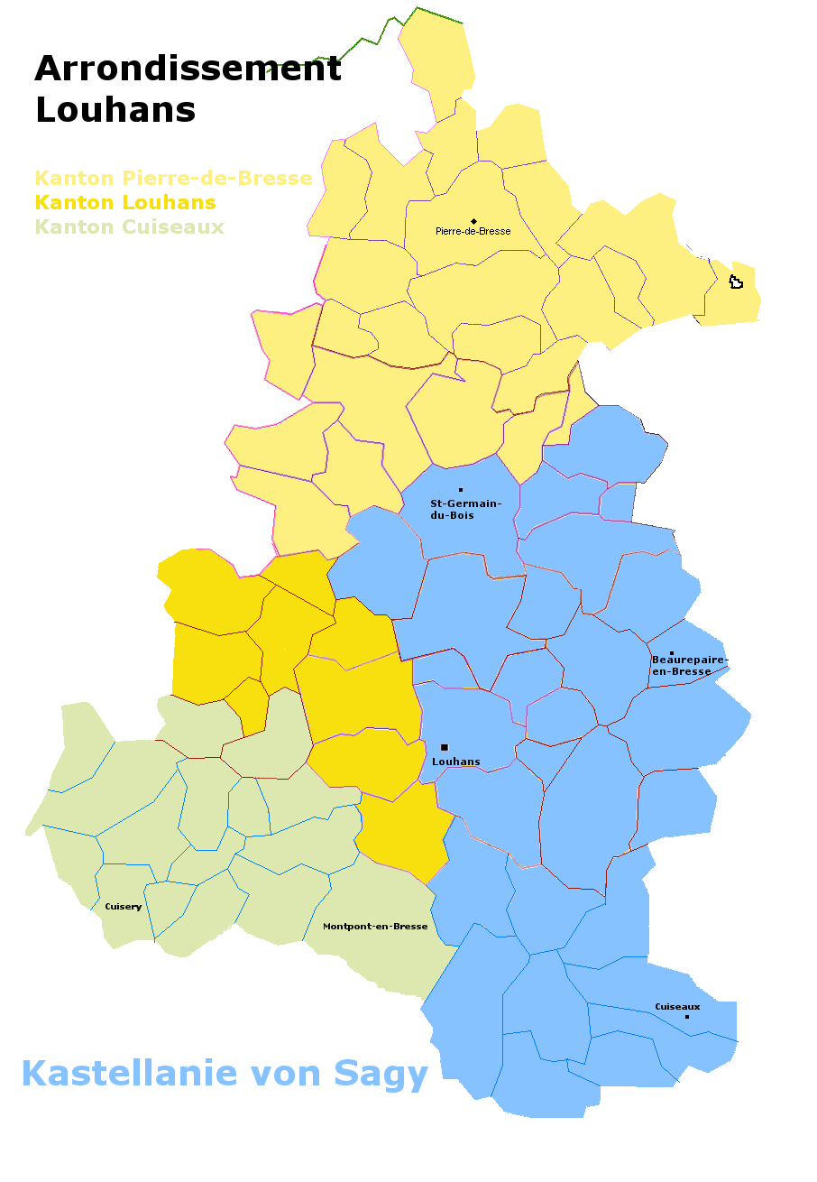 Hoheitsgebiet der Kastellanie von Sagy